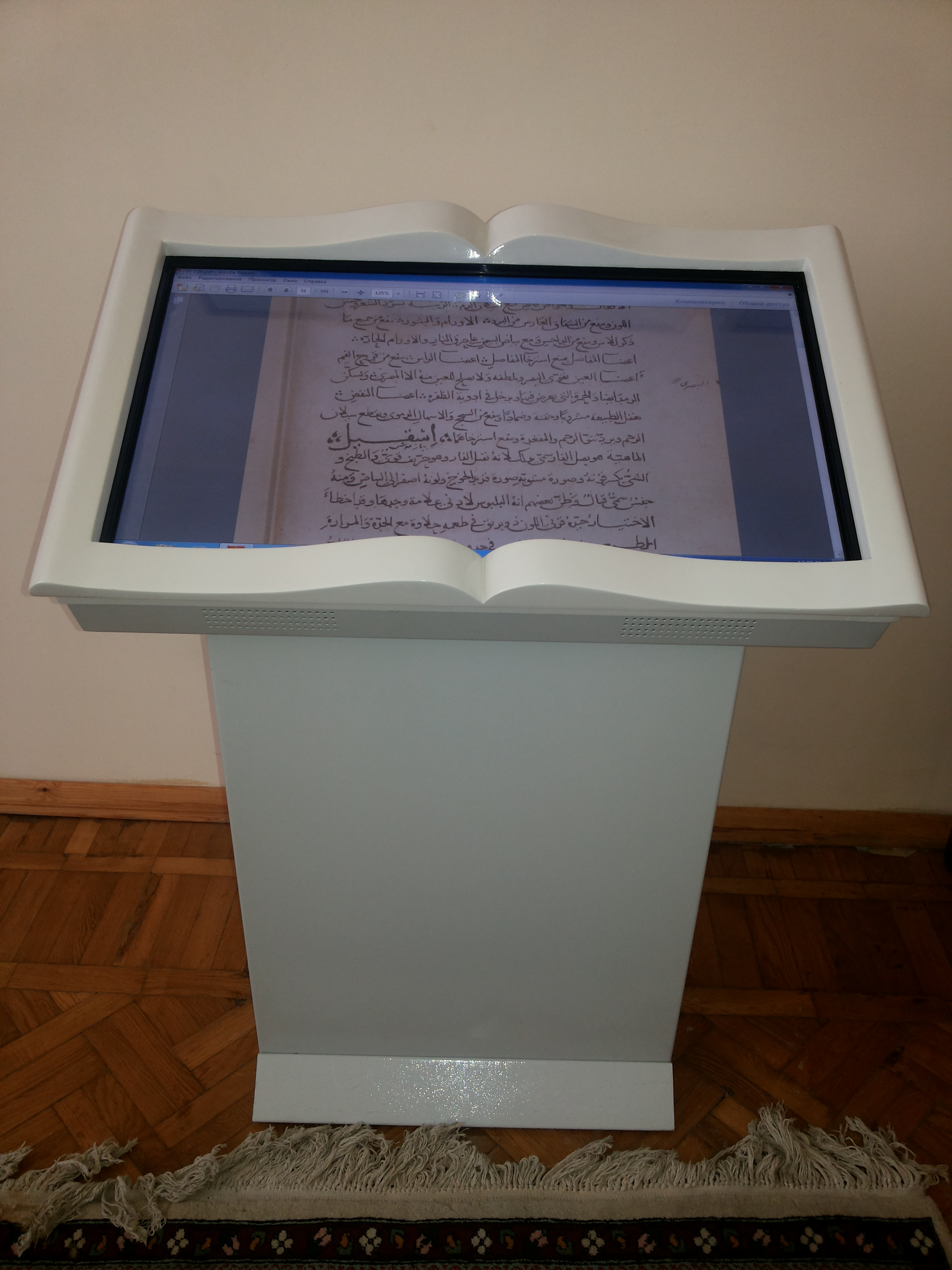 Elektron köşk